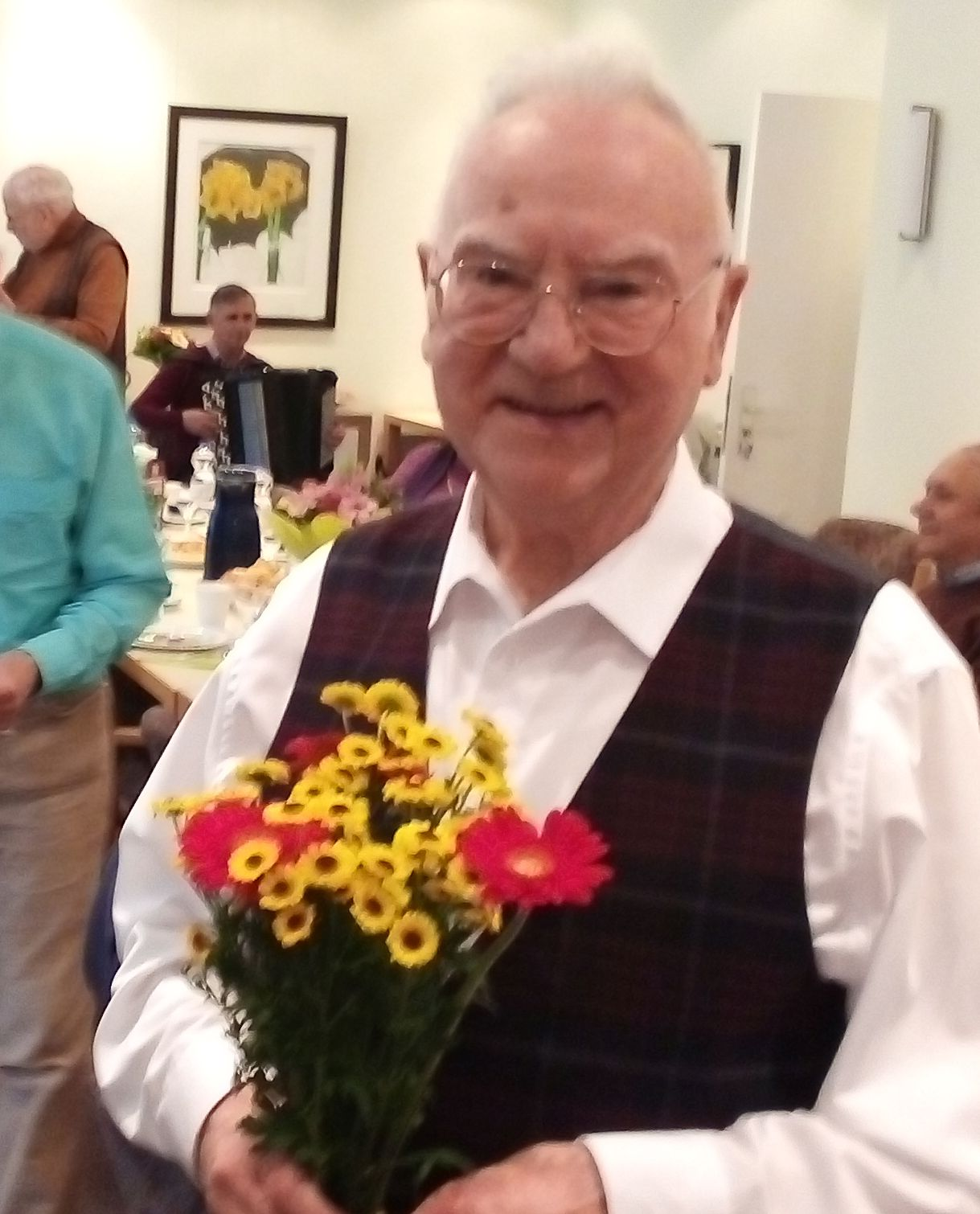 La Esperantisto Hans Moser dum jubileo de la grupo en novembro 2029 en Berlin